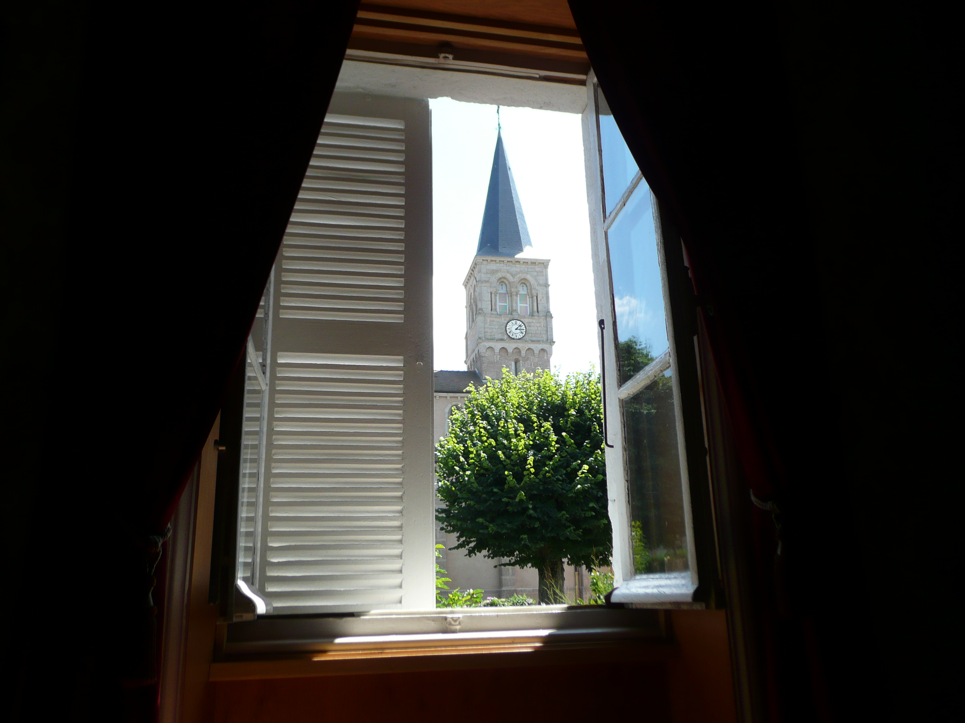 Clocher de l'église de Verosvres en Saône-et-Loire (France)